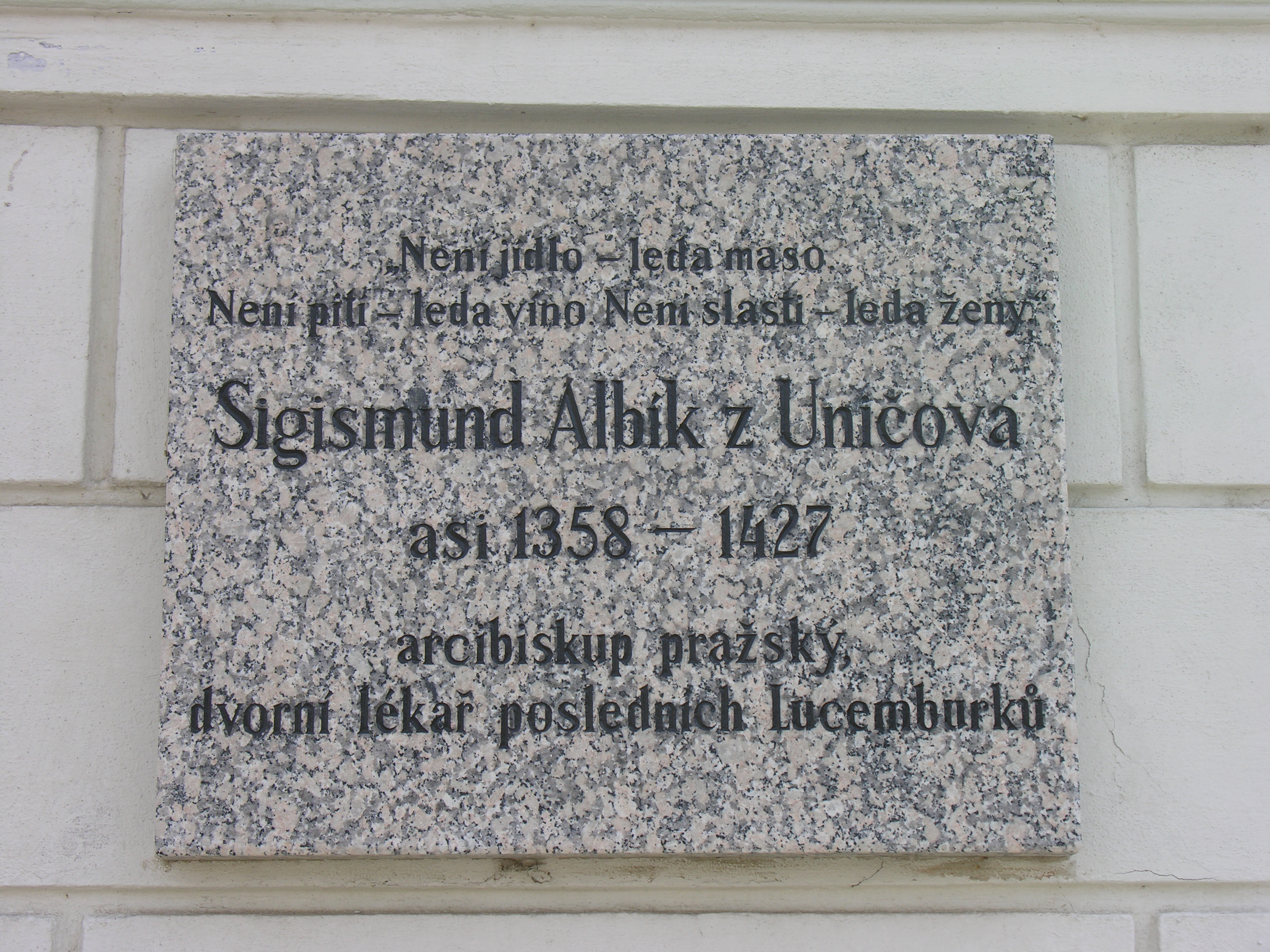 Gedenktafel für Siegmund Albich (Sigismund Albík) am Rathaus in Uničov (Mährisch Altstadt)